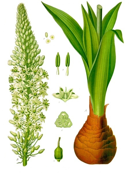 Weiße Meerzwiebel. A B Theile der Pflanze in natürlicher Grösse. 1. Blüthe im Längsschnitte, etwas vergrössert; 2. Staubgefässe, vergrössert; 3. Pollen, desgl.; 4. Stempel, desgl.; 5. Fruchtknoten im Querschnitt, desgl.